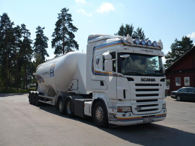 Ruud Transport for Rescon Mapei.